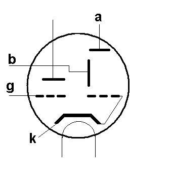 Schema indicator-buis; eigen werk; aangeboden onder GFDL